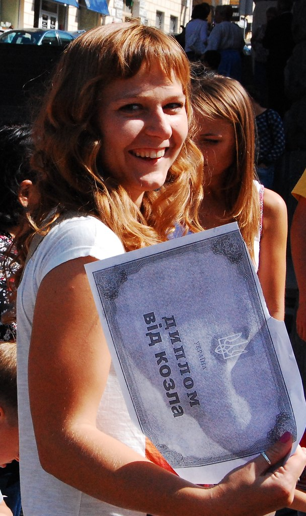 Екатерина Чепура на акции против Дмитрия Табачника 1 сентября 2012 года